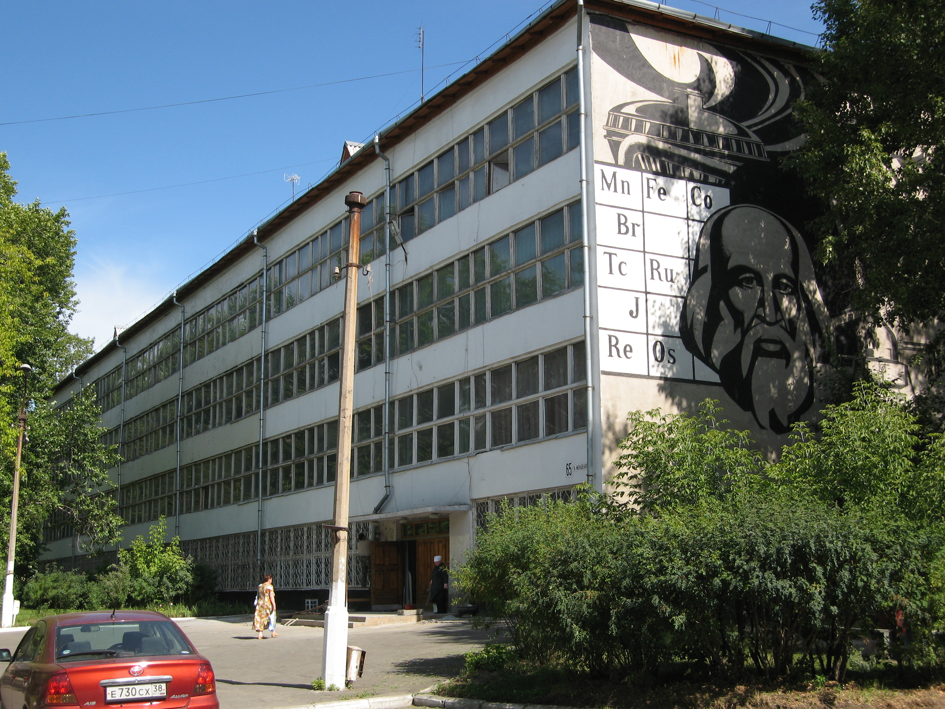 Филиал ИрГТУ в г. Усолье-Сибирское